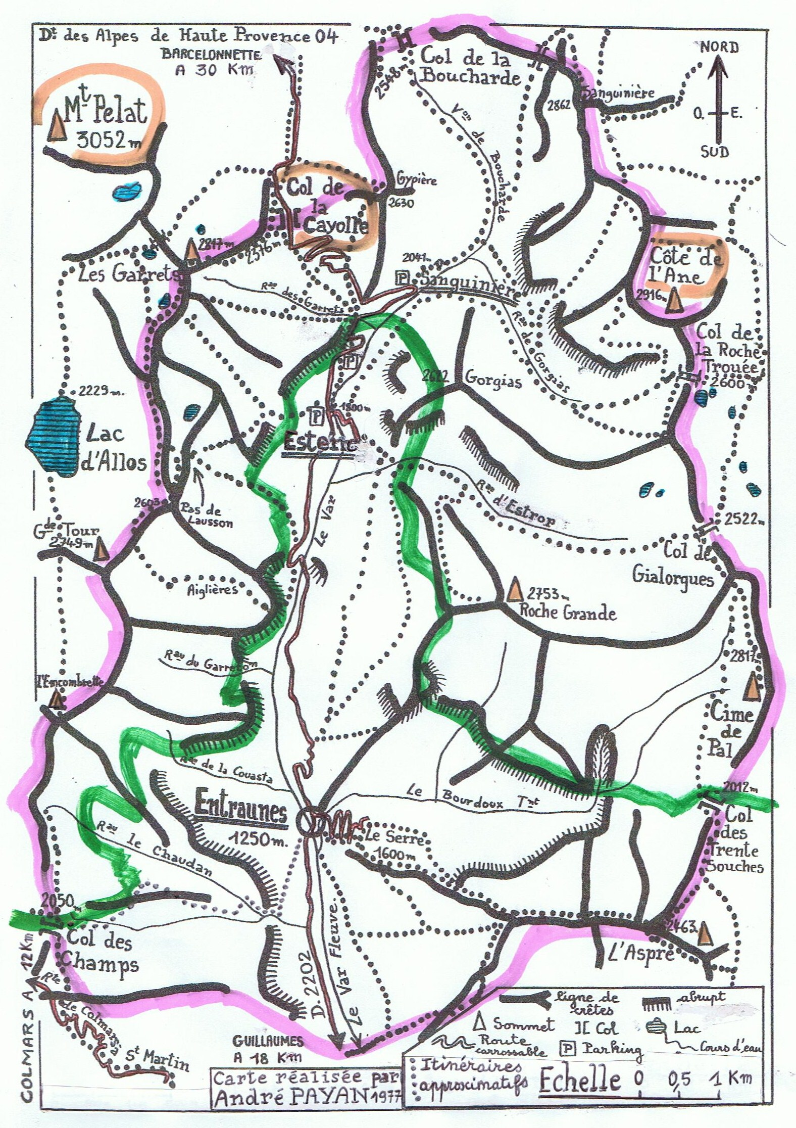 Carte simplifiée de la commune d'Entraunes (aux limites en rose) avec les itinéraires approximatifs à pied, en raquettes ou à ski (en pointillés) et la limite de la zone centrale du Parc national du Mercantour (en vert)